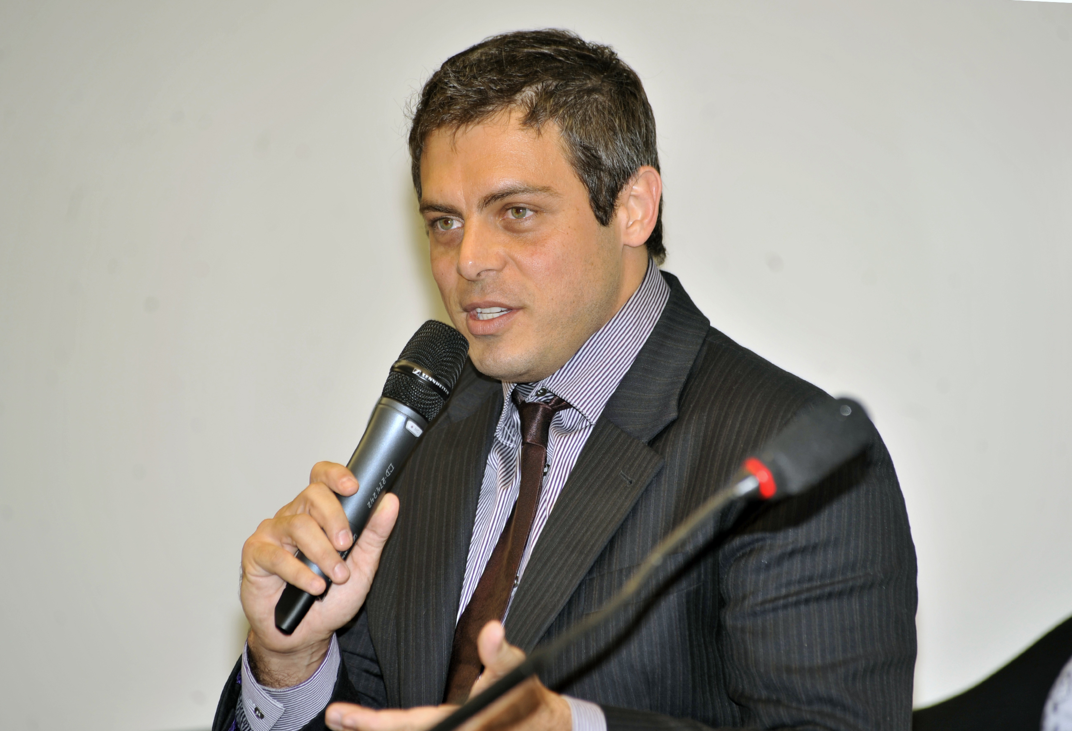 O ator e apresentador de televisão Luigi Baricelli, participa de audiência na Comissão Parlamentar de Inquérito (CPI), que investiga as causas e consequências e responsáveis pelo desaparecimento de crianças e adolescentes no Brasil, no período de 2005 a 2007.